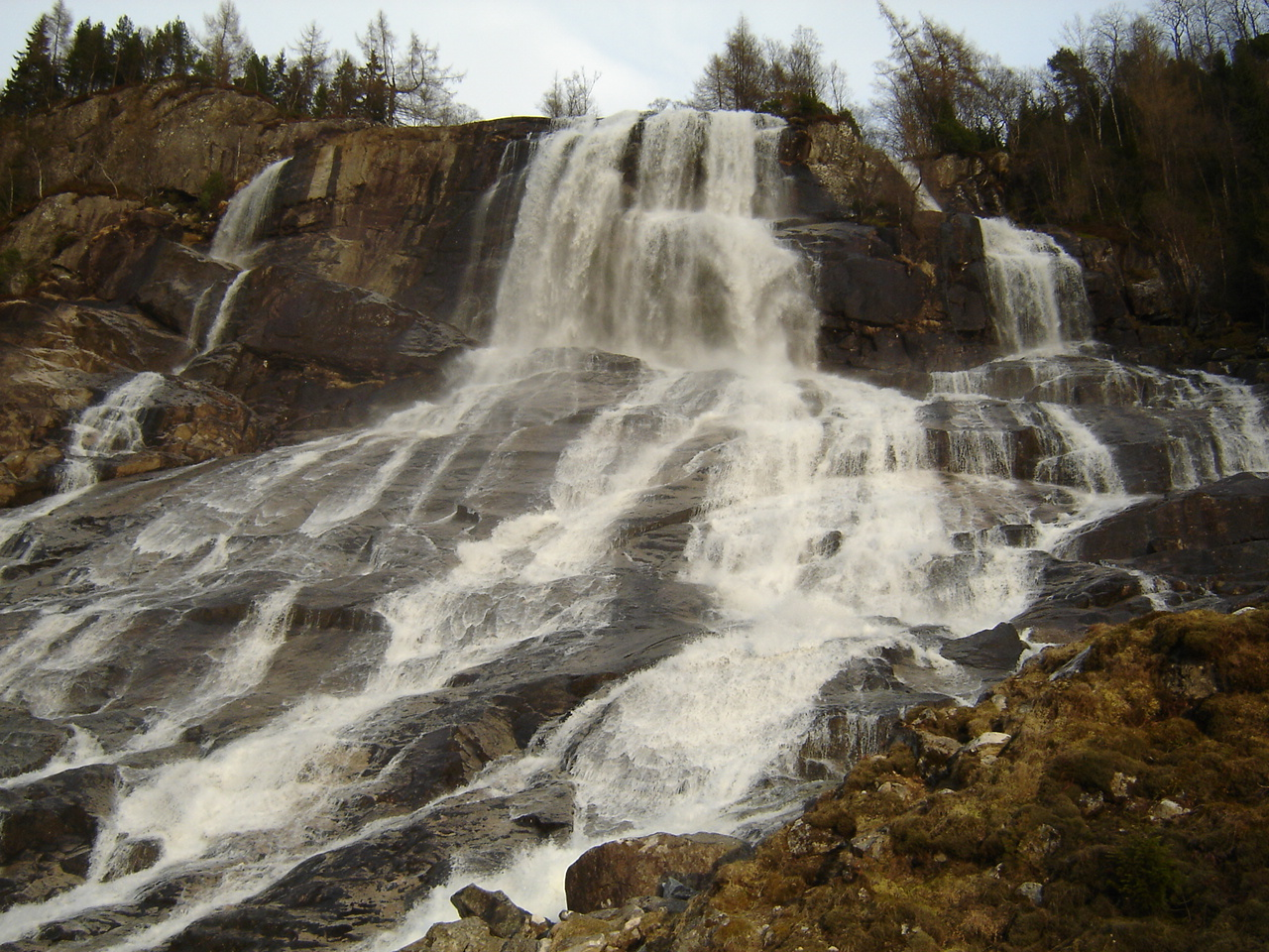 Wodospad Furebergsfossen, Kvinnherad, Norwegia; Waterfall Furebergsfossen, Kvinnherad, Norway